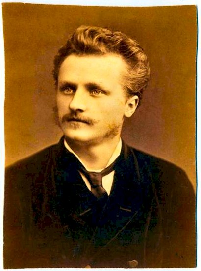 Koloriertes Foto von Ferdinand Karl Borromäus Putz von Rolsberg, 1880